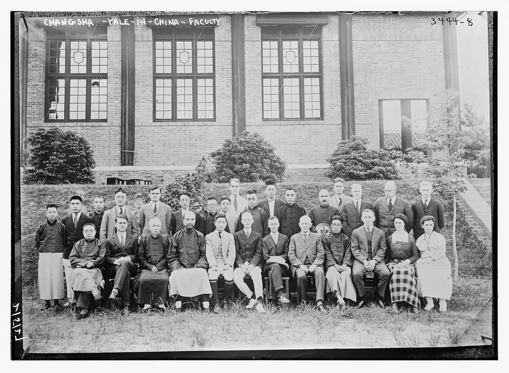 長沙 雅禮大學堂 教職員合照